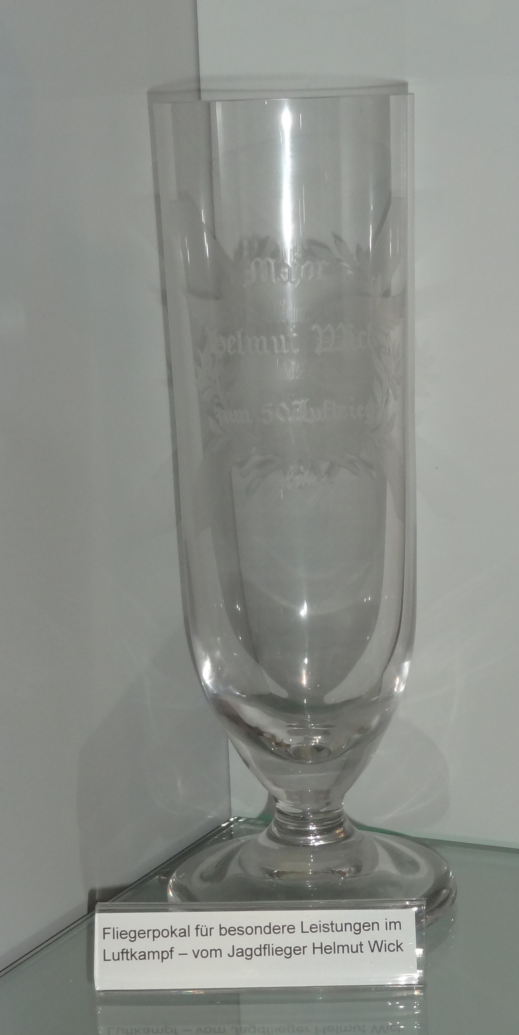 Helmut Wick's Ehrenpokal der Luftwaffe, Luftfahrtmuseum Hannover-Laatzen